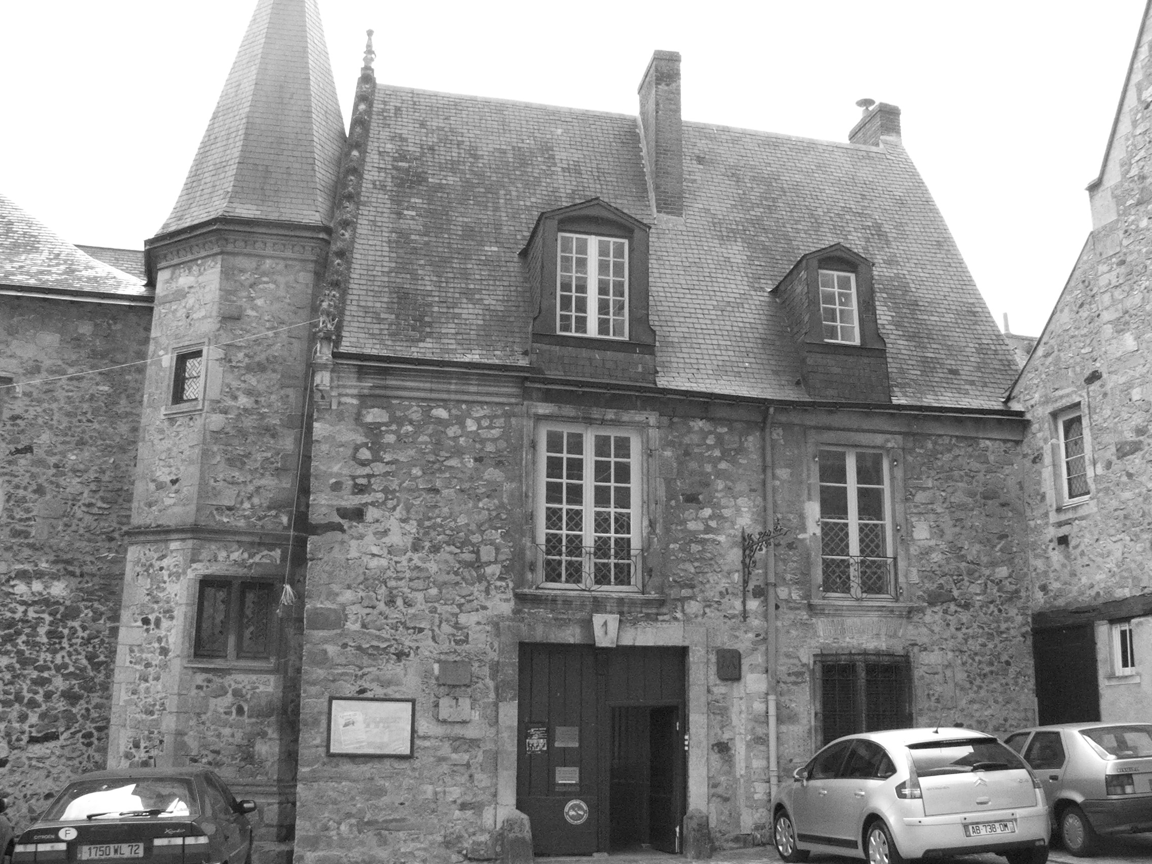 La maison de Scarron datant du XIIè siècle. Le poète y a vécu de 1633 à 1646. Elle est située dans la cité plantagenêt au Mans.